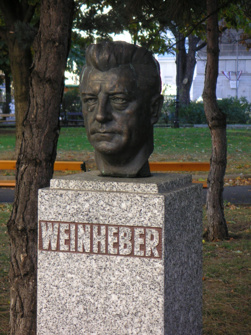 Büste von Josef Weinheber im Schillerpark in Wien, Bildhauer: Josef Bock, 1940